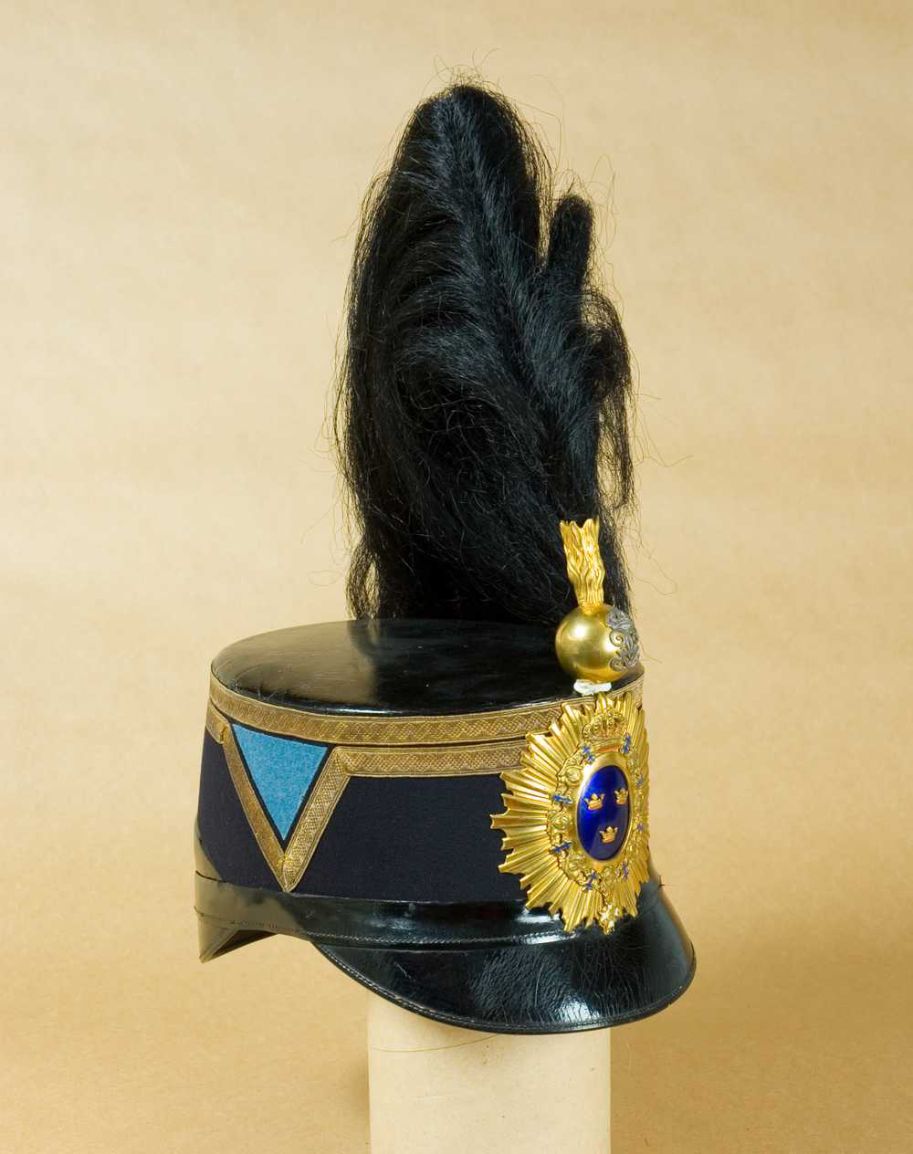 Käppi m/1880 för överste vid Svea artilleriregemente (A 1).